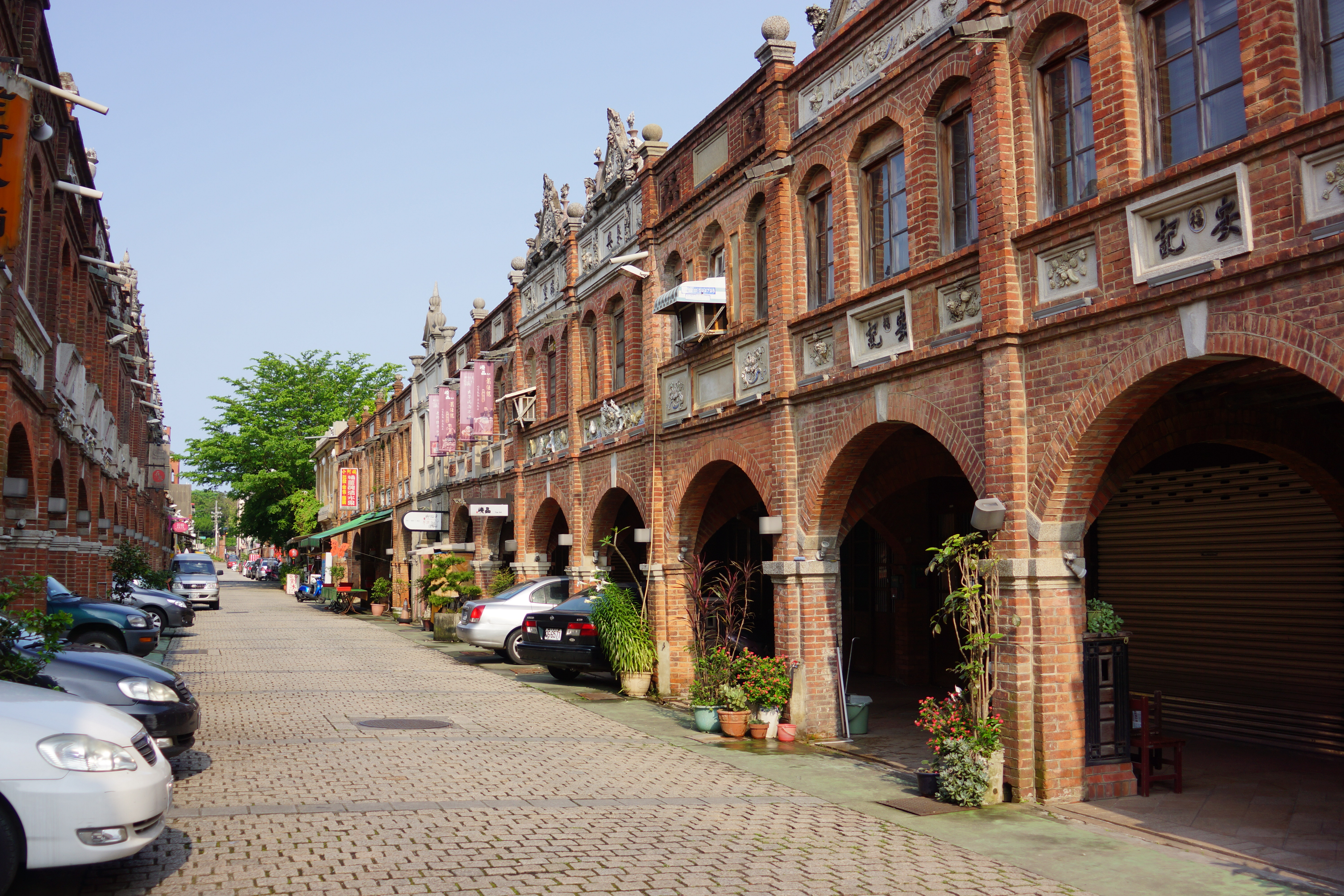 湖口老街 Hukou Old Street